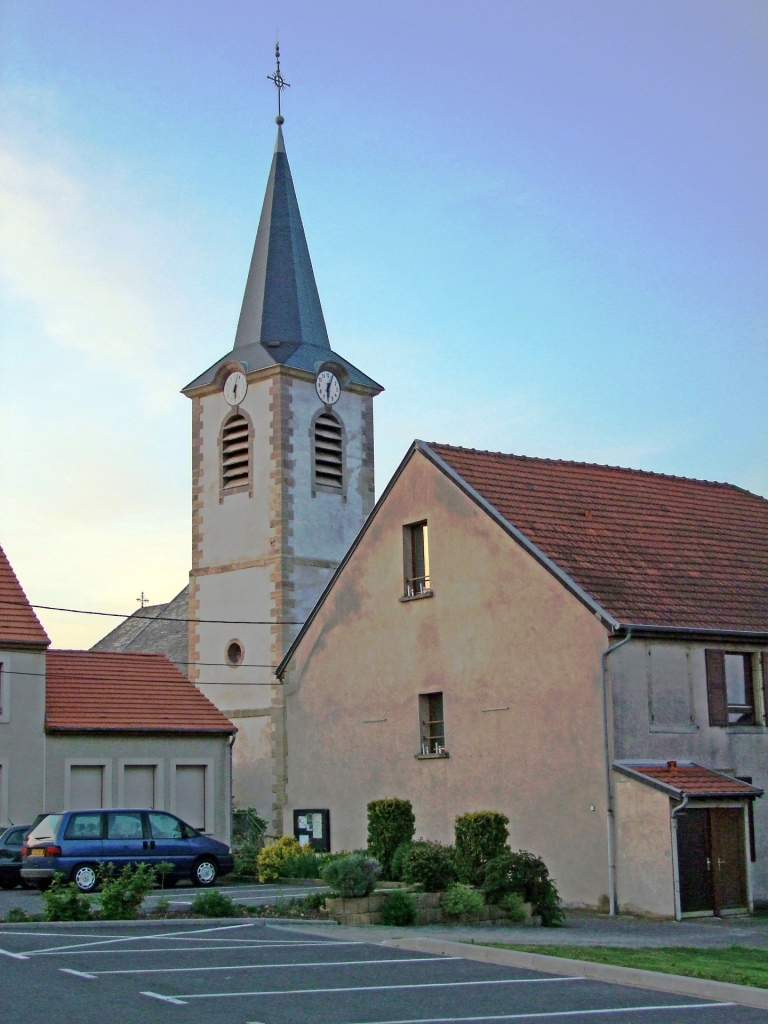 Eglise paroissiale